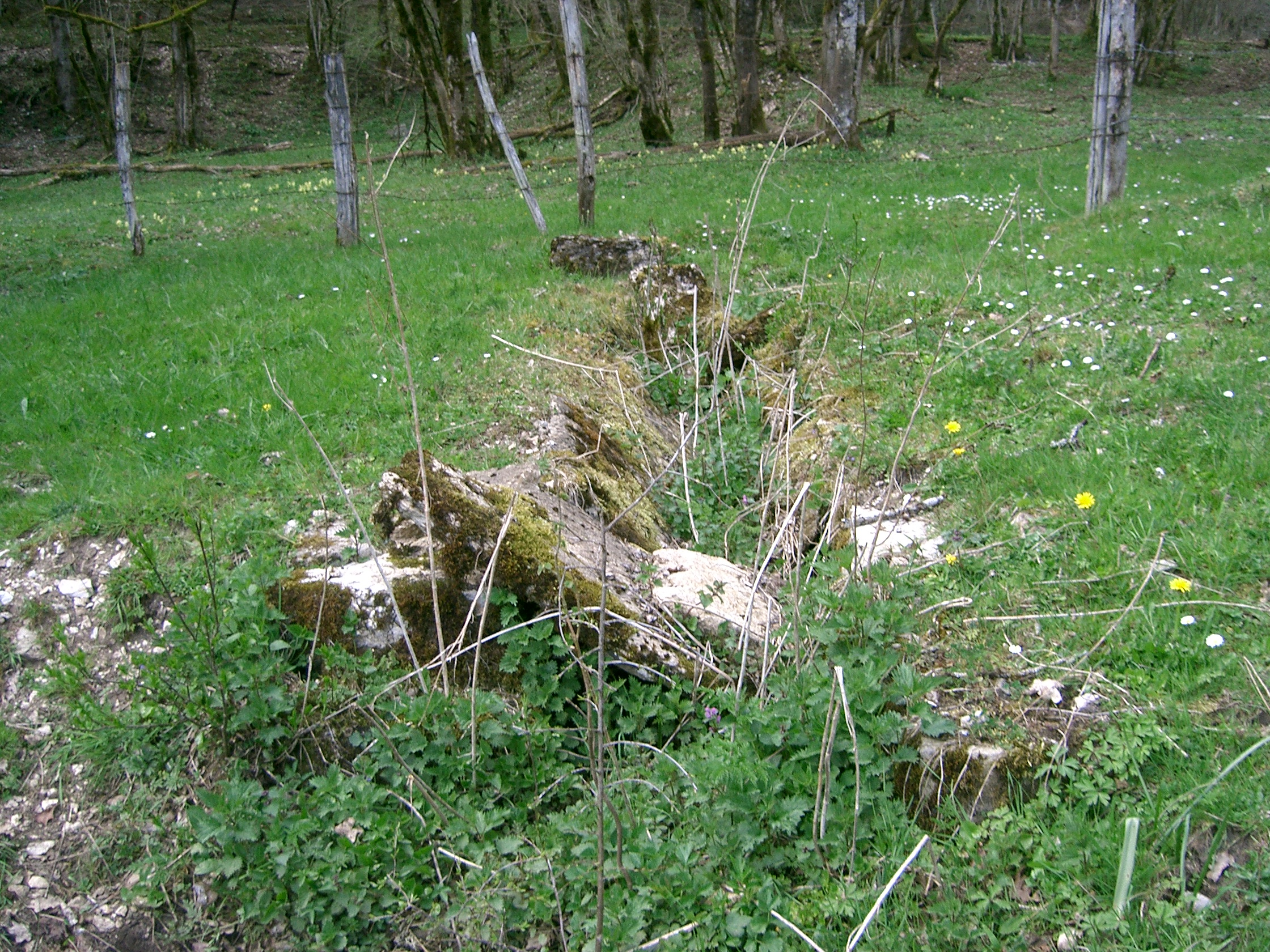 Trace des aménagements des moines à Balerne (petit canal : captation d'une source) - Jura - France